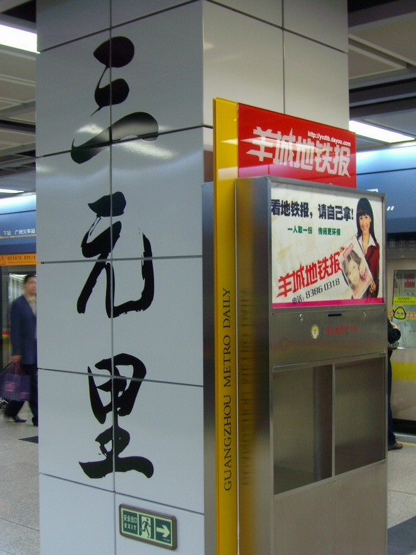 广州地铁三元里站